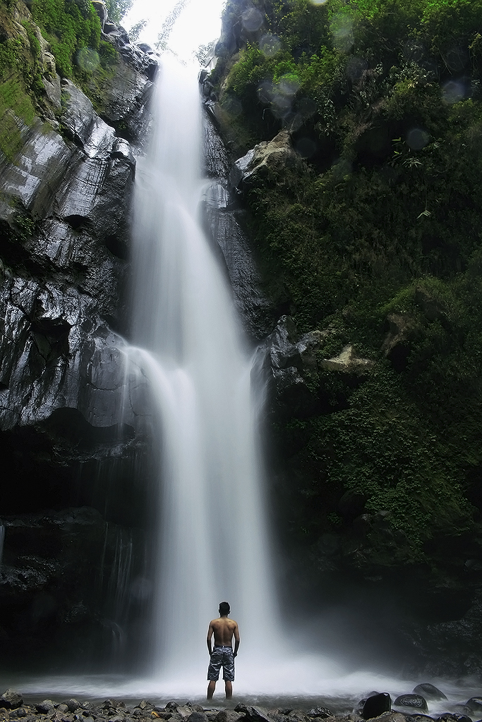 Air Terjun Kedung Kayang terletak di Jalan Ketep Pass, Desa Wonolelo, Sawangan, Magelang, Jawa Tengah